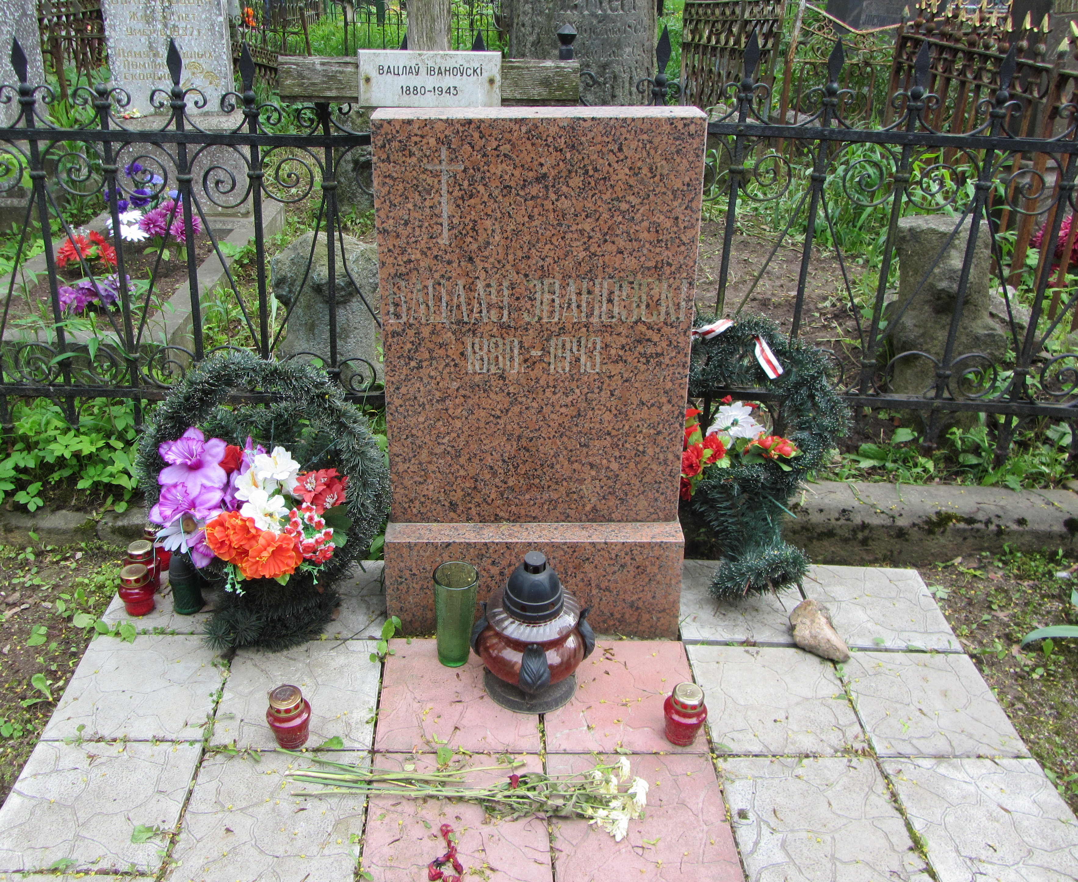 Беларуская (тарашкевіца): Магіла Вацлава Іваноўскага на Кальварыйскіх могілках у Менску.